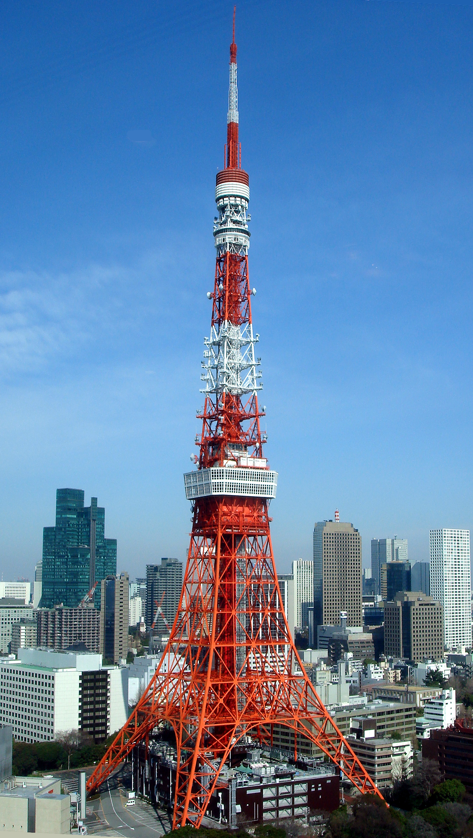 ホテル The Prince Park Tower Tokyo 33階よりガラス越しに撮影した東京タワー。